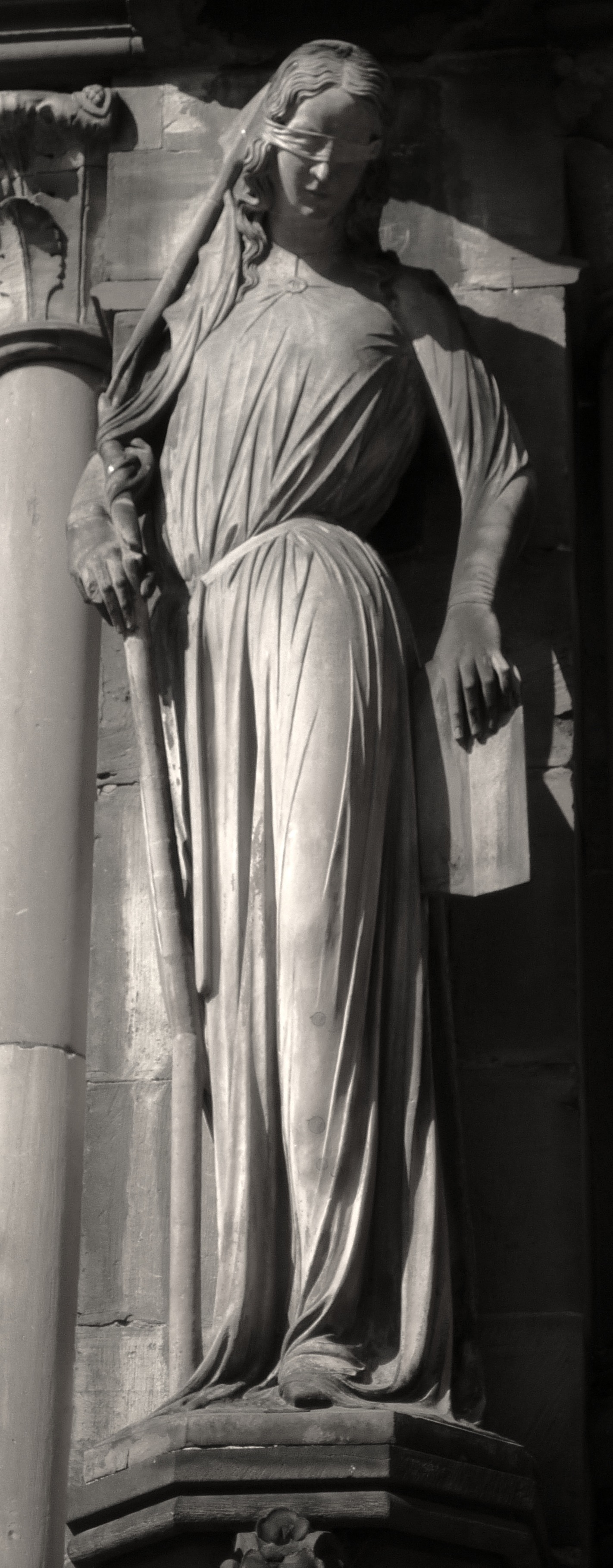 Strasbourg, Cathédrale Notre-Dame, La Synagogue.